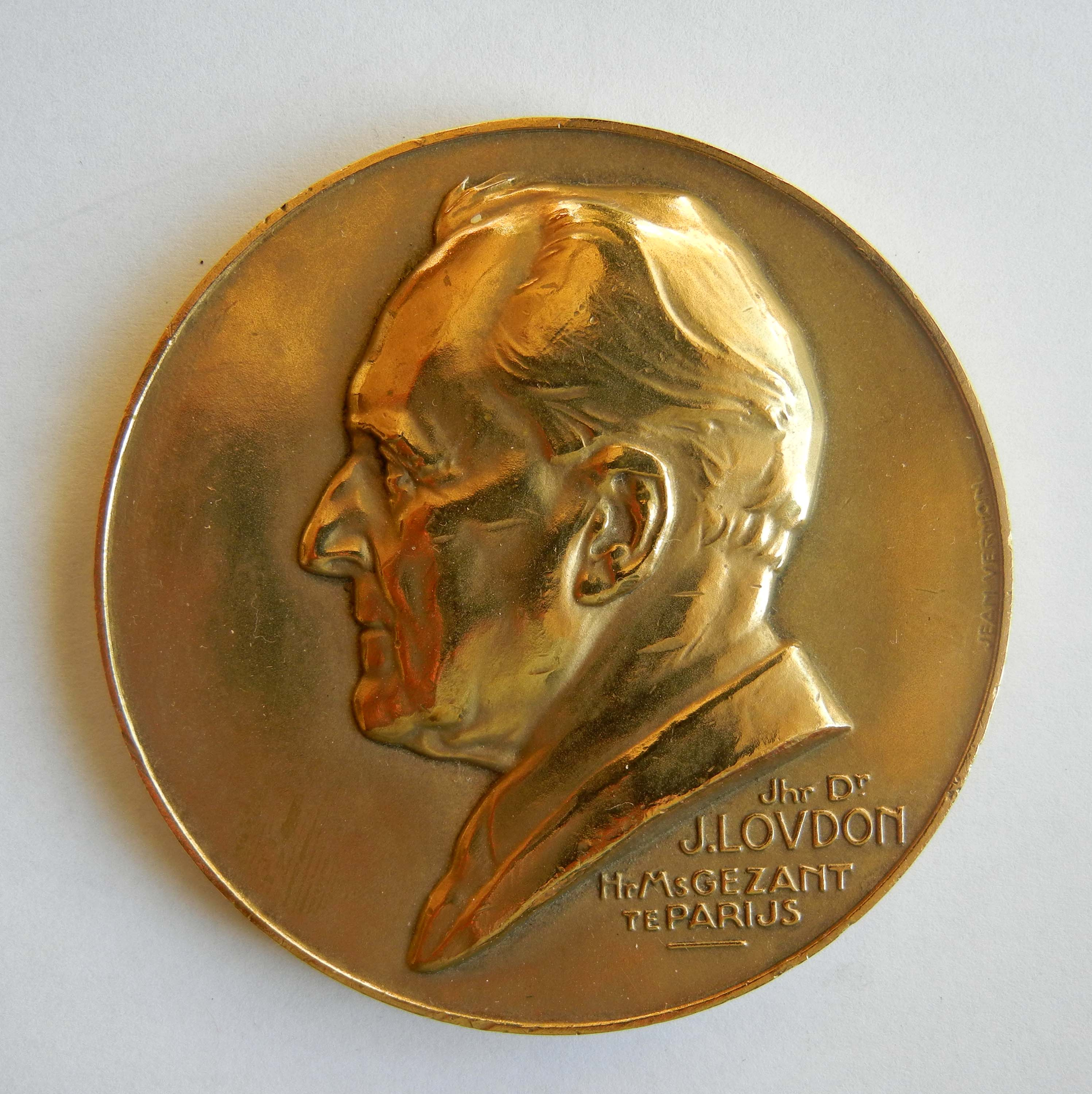 Médaille John Loudun (1866 – 1955) Ambassadeur hollandais à Paris de 1919 à 1940 IV LVSTRA FELICITER PERACTA Graveur : Jean de VERNON en bronze Diamètre 68 mm Poids 159 grs